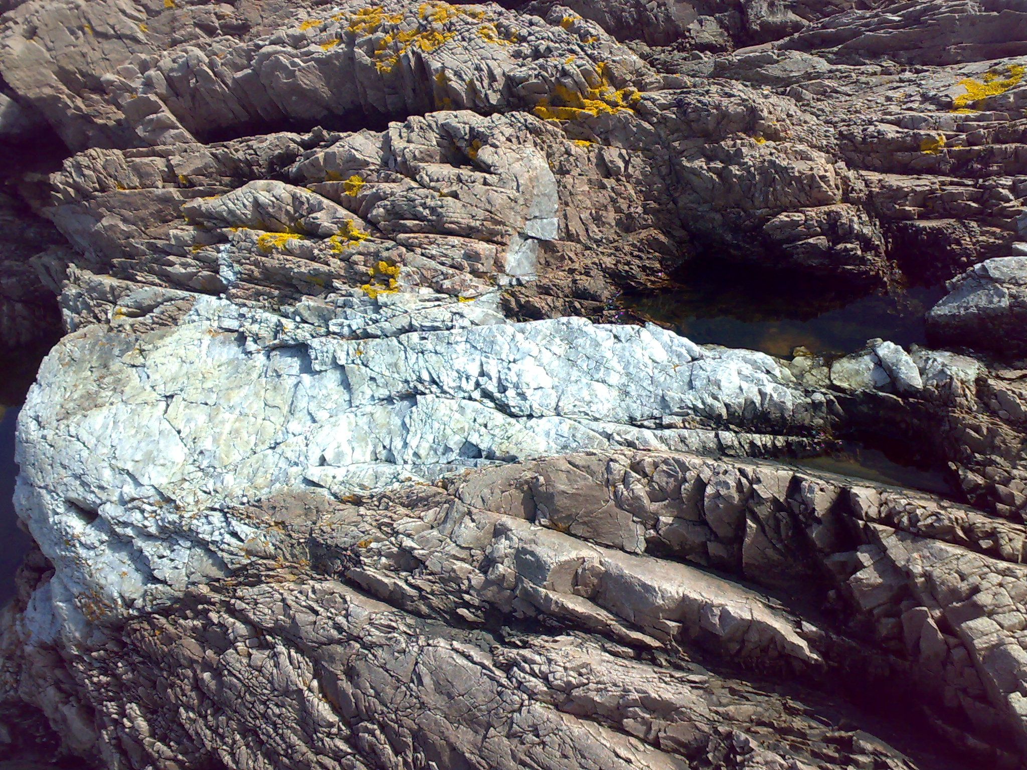 Kvarts i gneis og hornfels